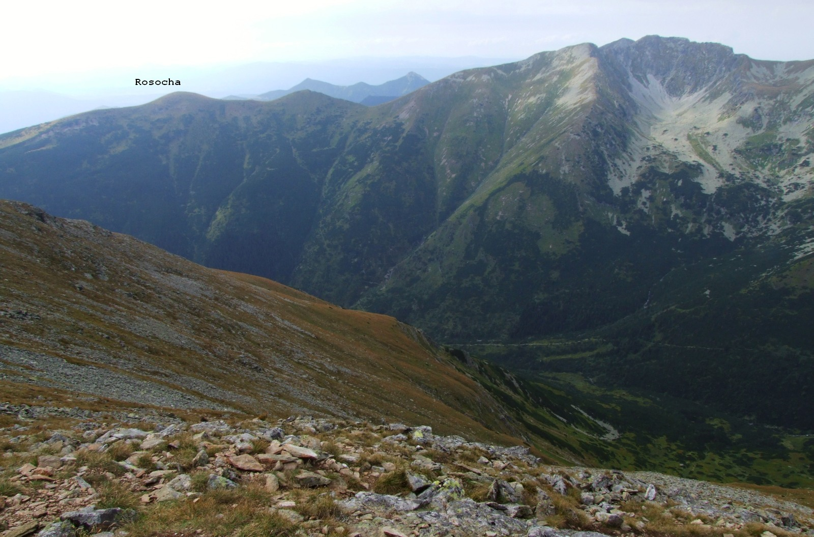 Dolina Żarska, widok ze Smreka. W grani od lewej: Rosocha, Jałowiecka Kopa, Jałowiecki Przysłop, Banówka